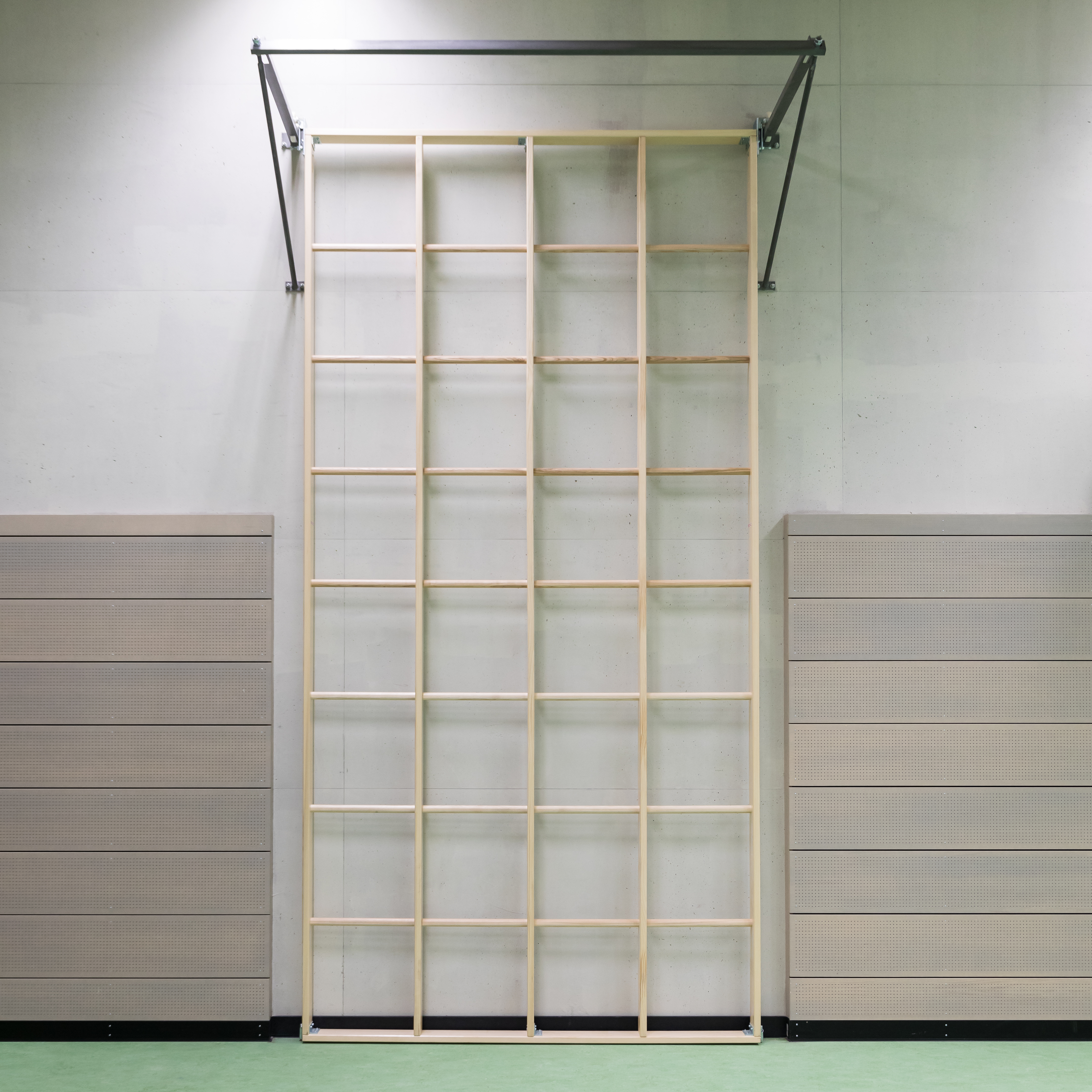 Erweiterungsbau Albertus-Magnus-Gymnasium Köln. Unterirdische Turnhalle. Sprossenwand